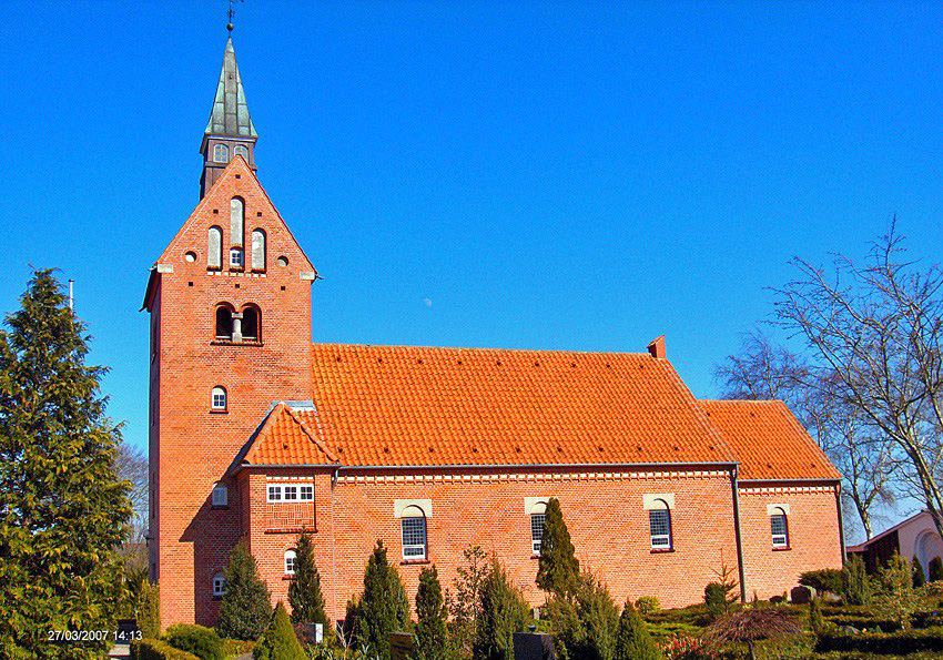 fra syd